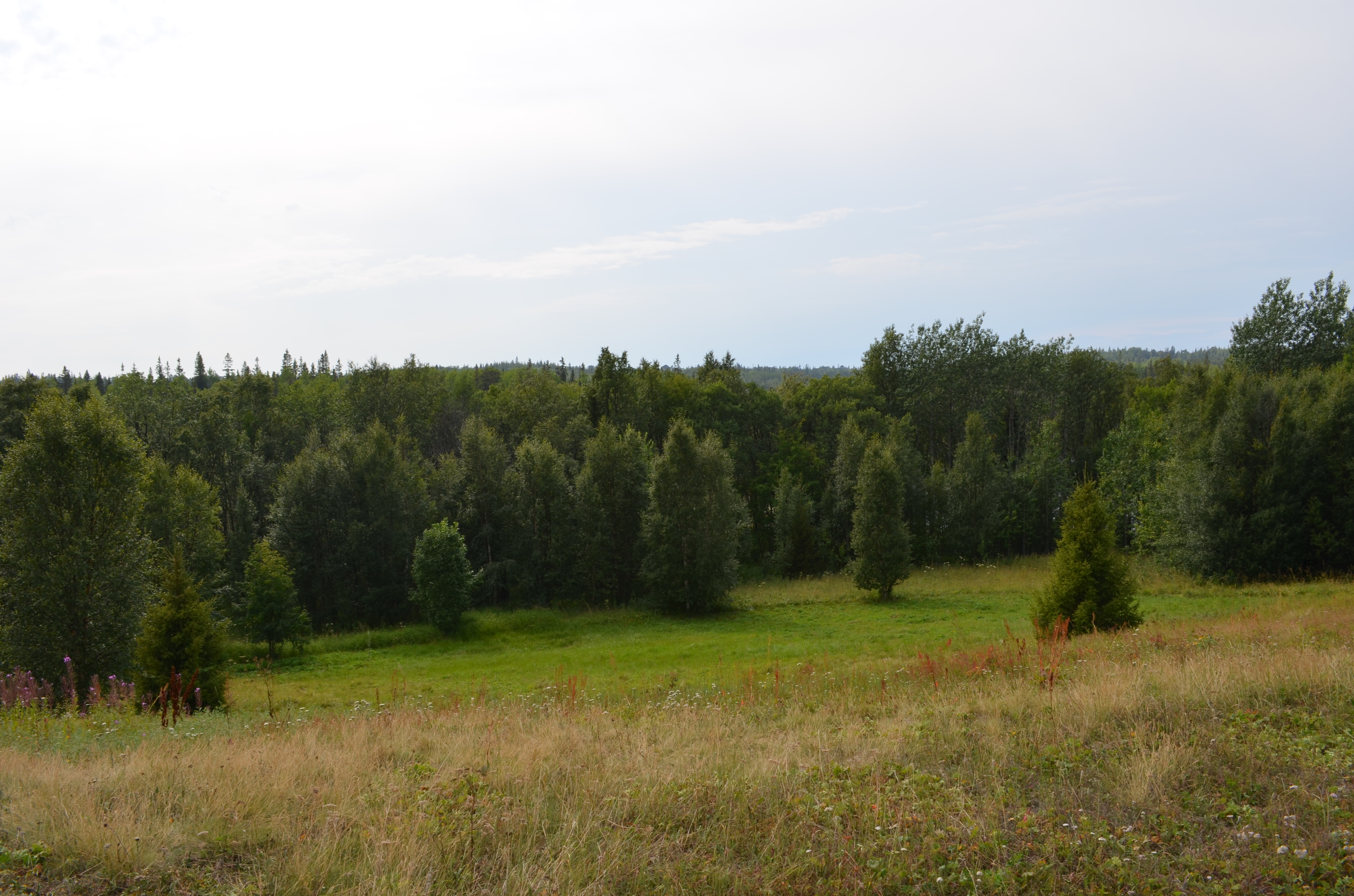 Острів Анзерський